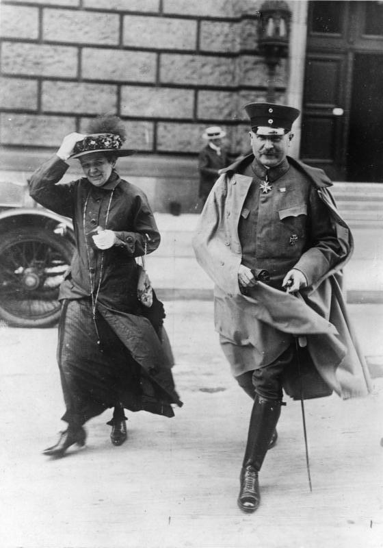 Wilhelm Groener mit Frau Zentralbild Generalleutnant Wilhelm Groener. Chef des neuen Kriegsamtes im preußischen Kriegsministerium und Stellvertreter des Kriegsministers am 27.8.1917 mit seiner Frau. 9687-17 Abgebildete Personen: Groener, Wilhelm Dr.: Reichswehrminister, Reichsinnenminister, Deutschland